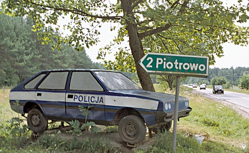 Kuvassa FSO Polonez vuodelta 1986-1989. Puolan poliisi kierrättää vanhoja poliisiautonromujaan valepoliisiautoina.